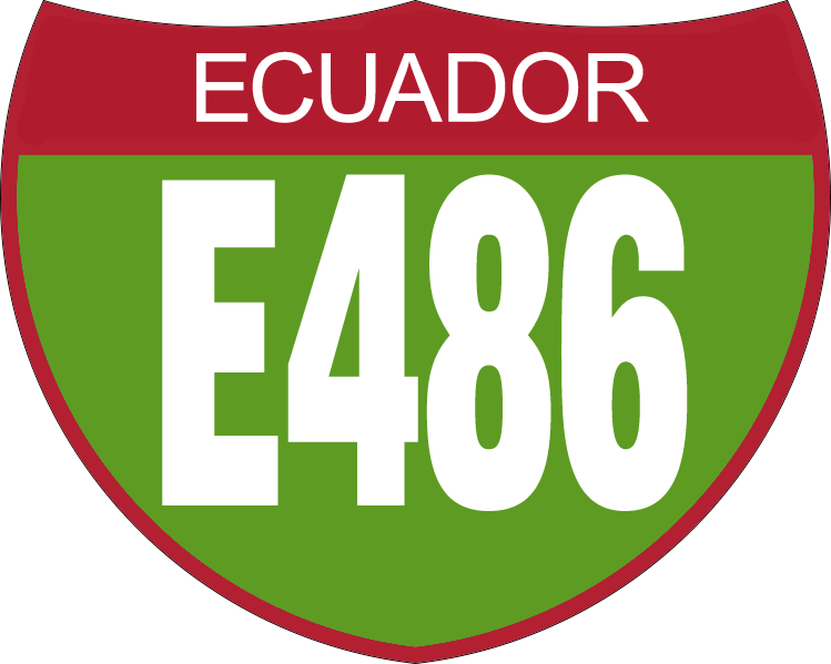 Disco de Identificación Ruta E486